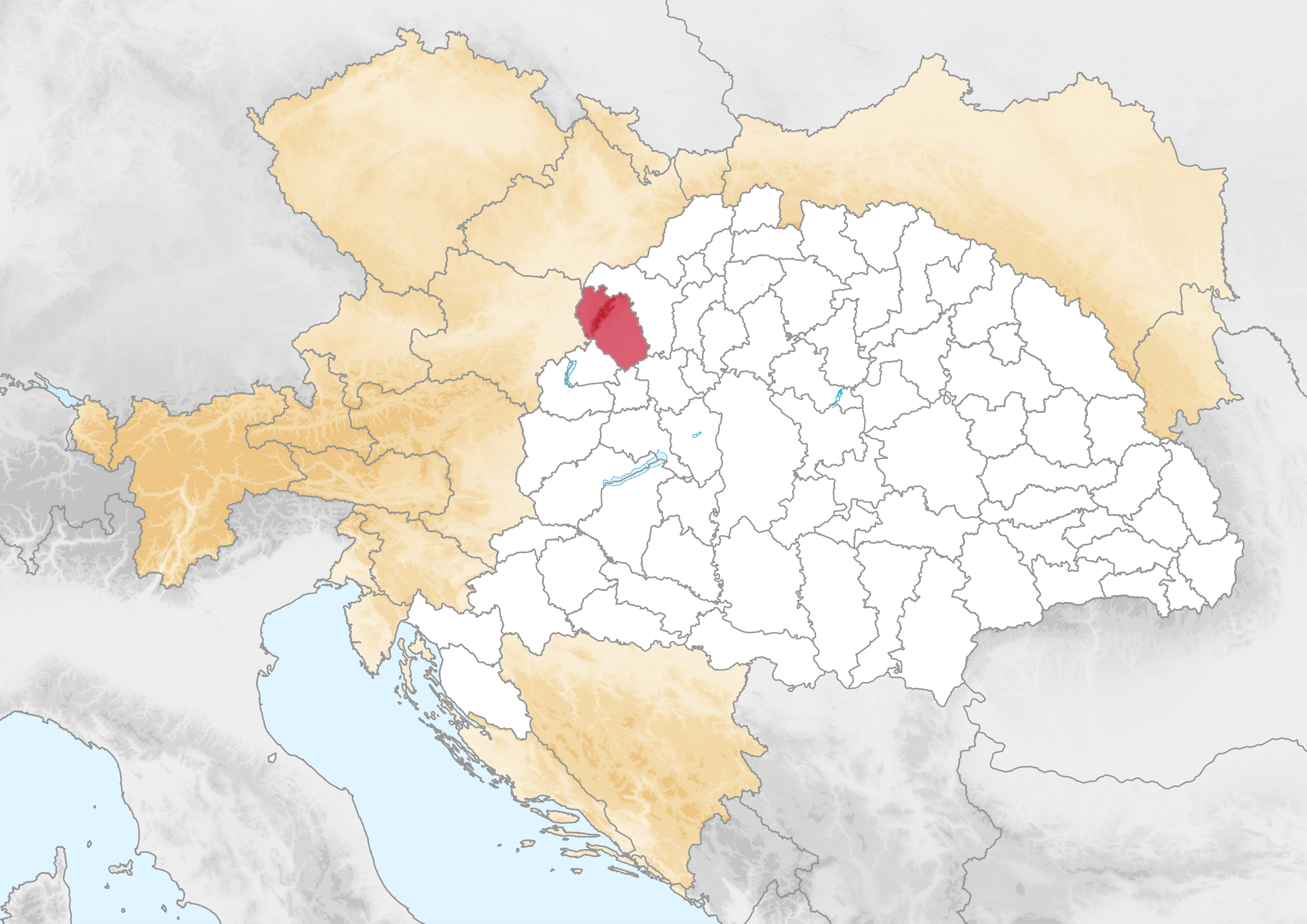 Carte du comitat de Pozsony dans le royaume de Hongrie (1914)